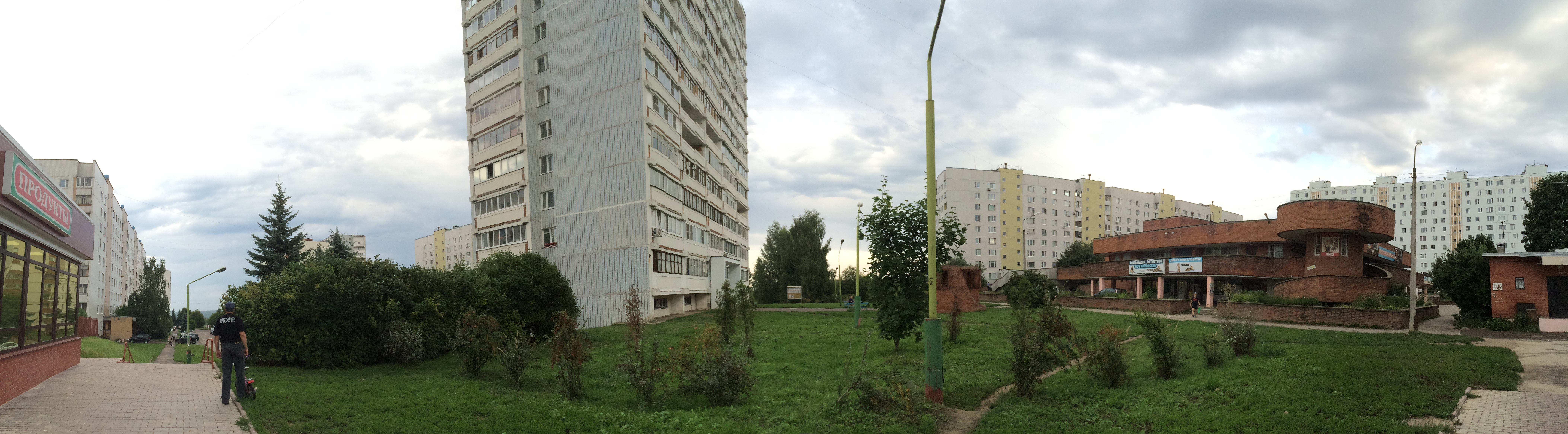 Panorama des Mikrorajons D in Puschtschino